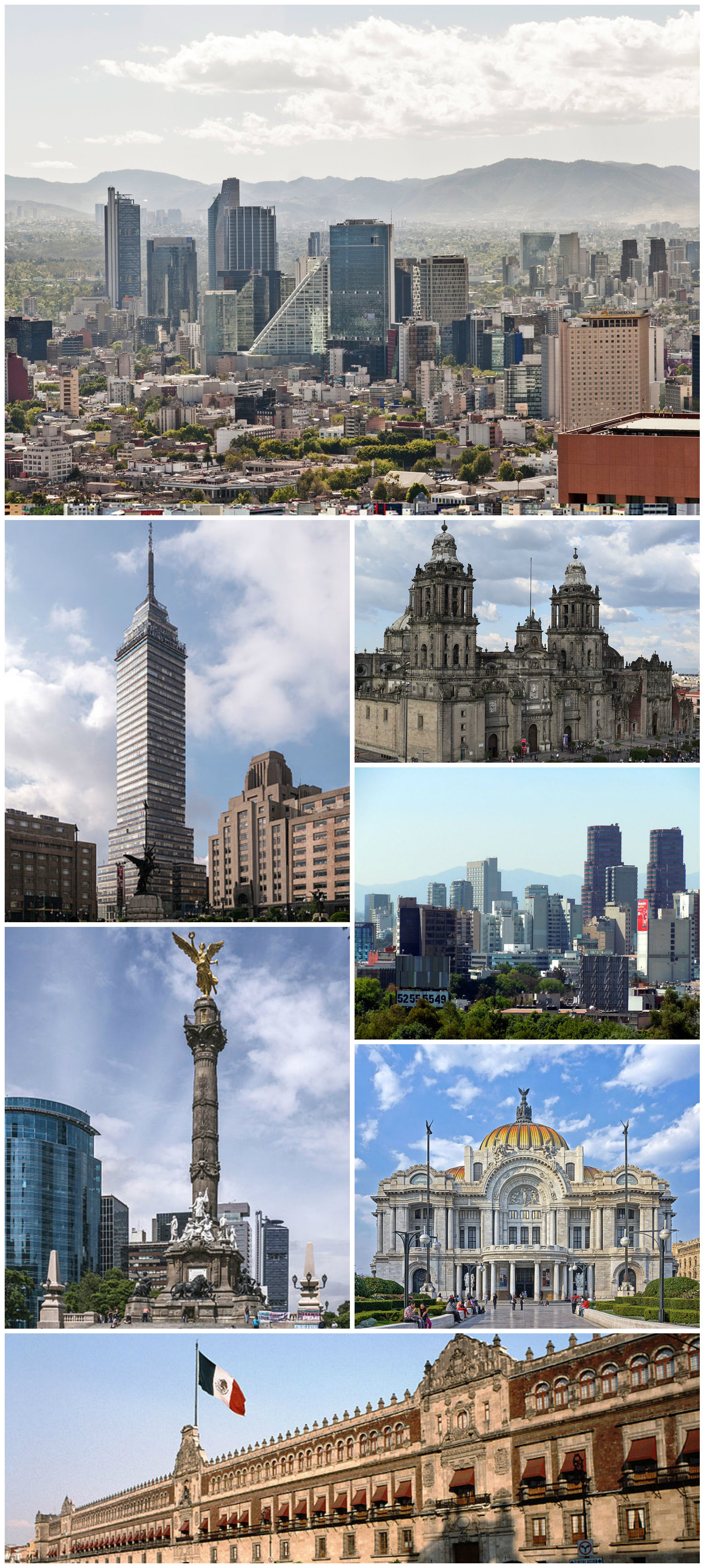 Ciudad de México